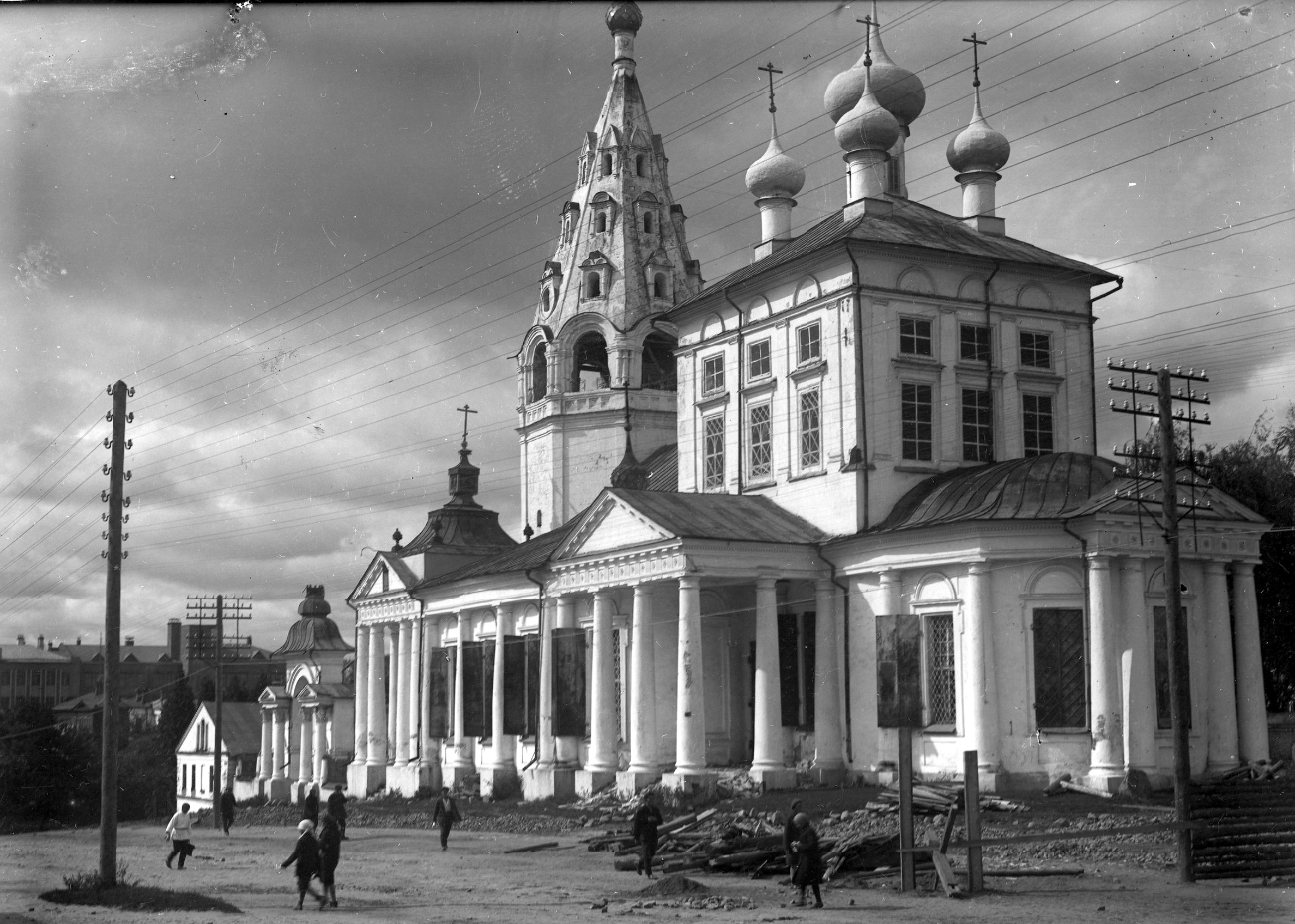 Троицкий собор в Иванове, снесён в 30-е